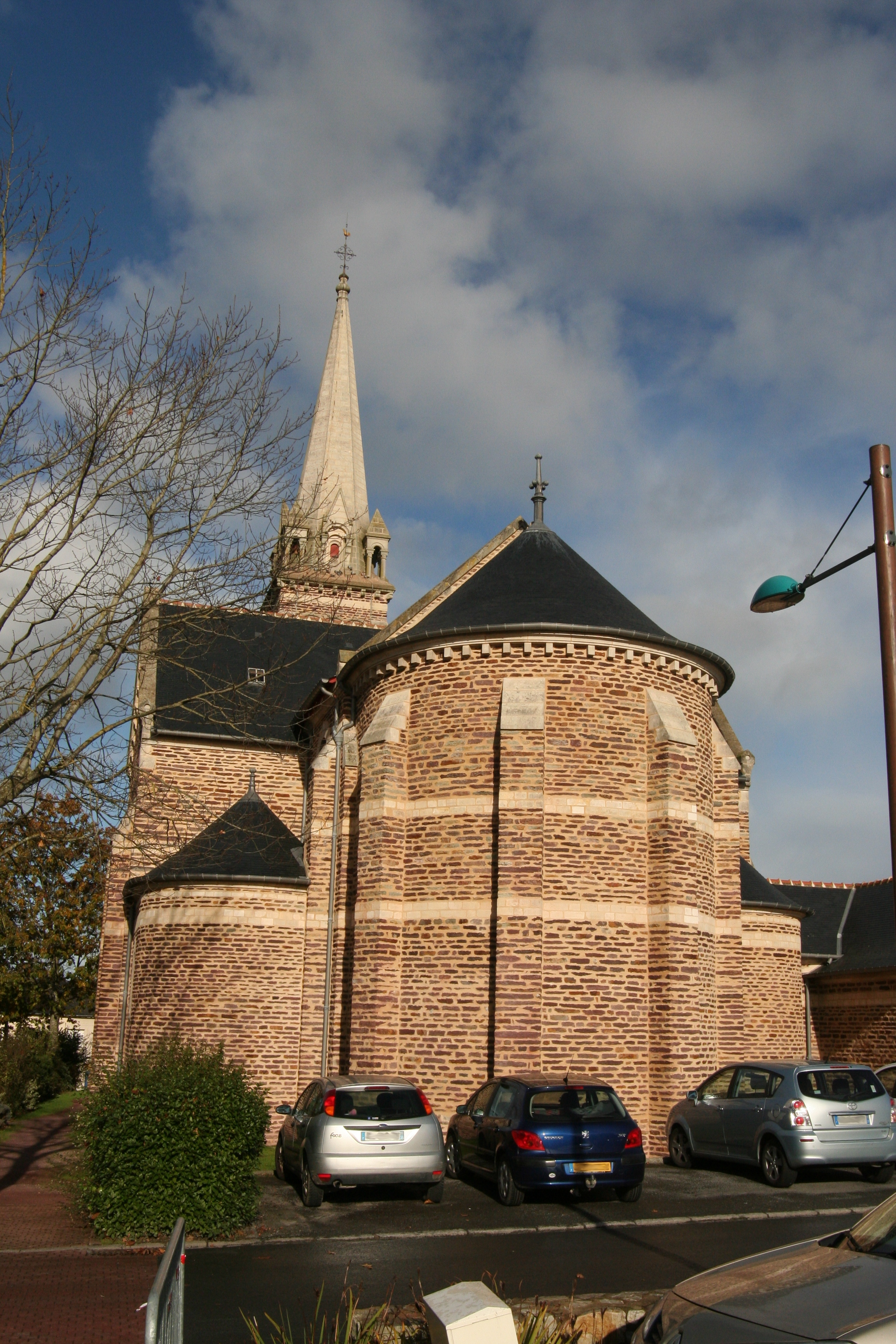 Église Saint-Joseph de La Chapelle-des-Fougeretz.